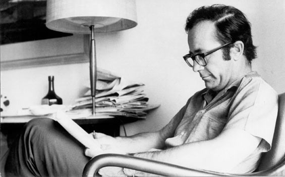 Escritor y periodista argentino